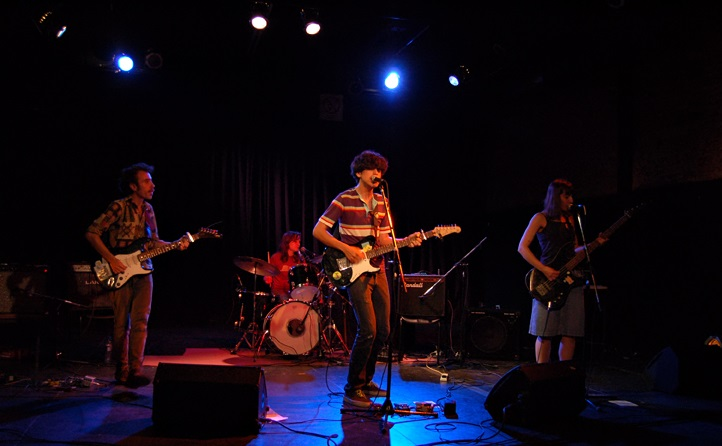 La Ola Que Queria Ser Chau